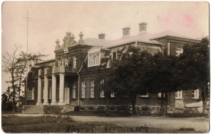 Utenos "Saulės" gimnazija, įsikūrusi buvusiuose Balcevičių dvaro rūmuose 1927 m. Iš Utenos kraštotyros muziejaus fondų